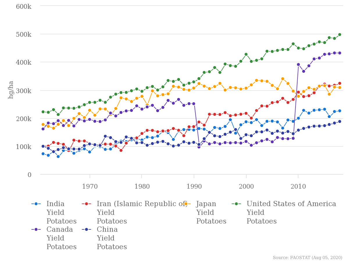 باروری مزارع سیب زمینی